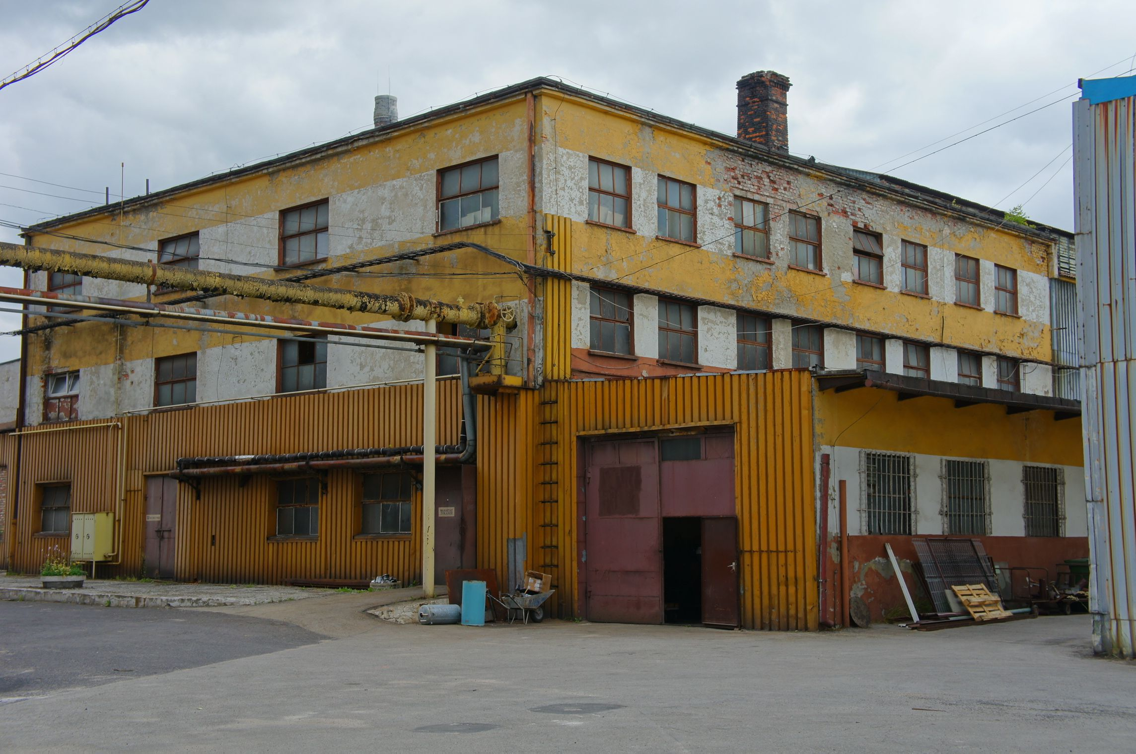 Budynek huty szkła Zawiercie w Zawierciu, Poland